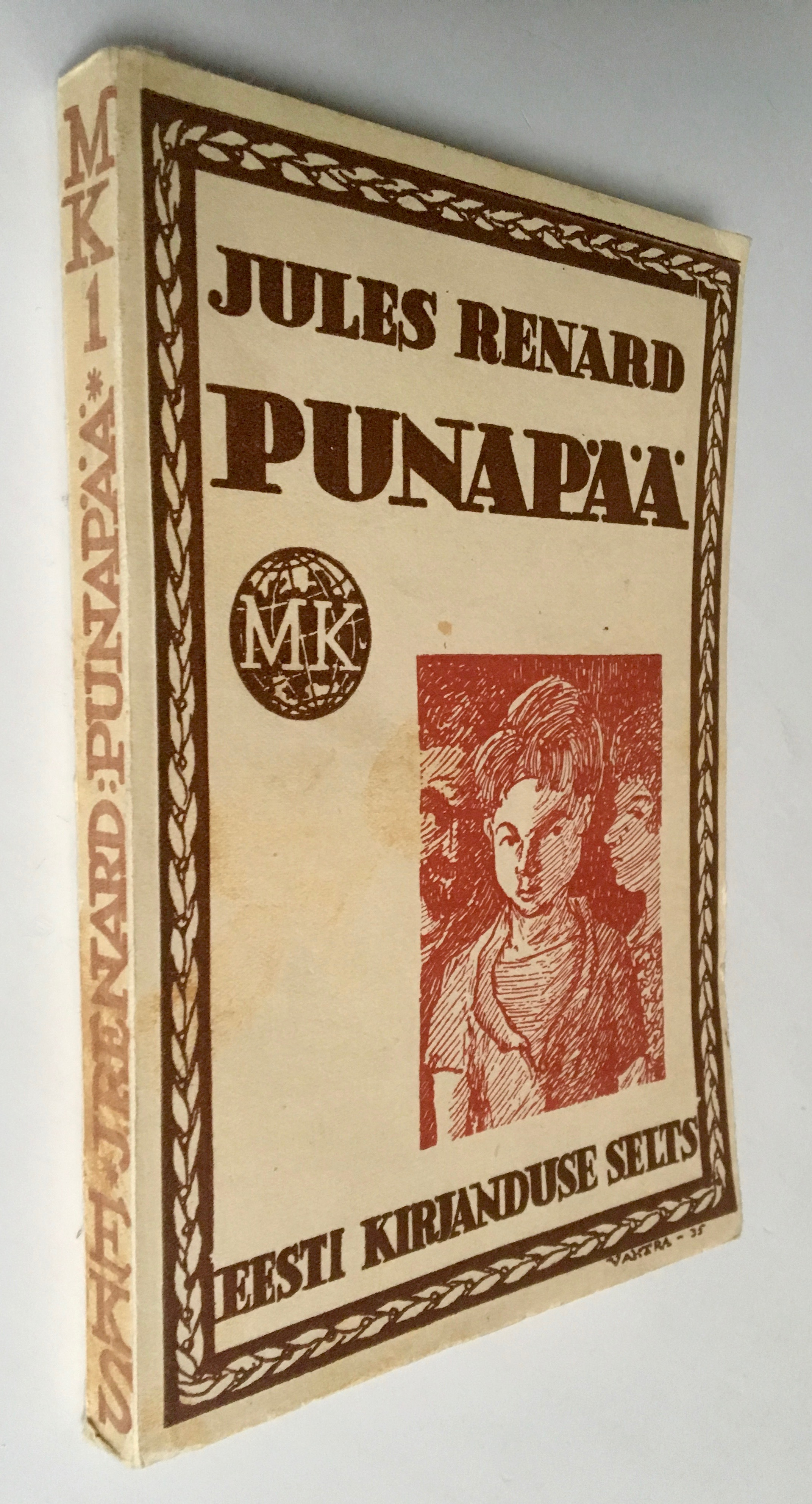 Sarja esimesena ilmunud raamatu pehme köide kujundus nägi välja selline ning millegipärast ka ainsaks.